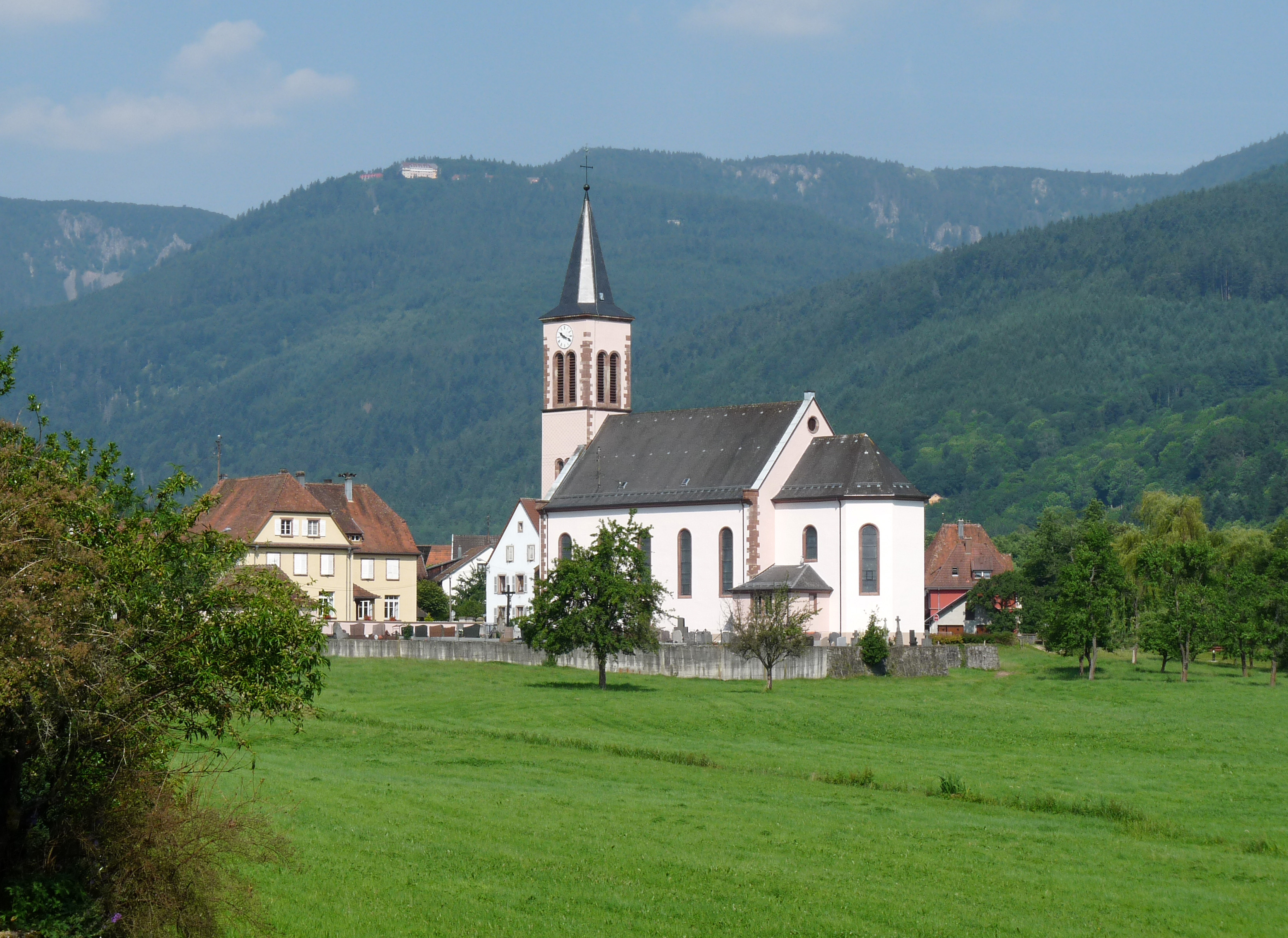 Eglise catholique Marie-Auxiliatrice à Stosswihr (Haut-Rhin)